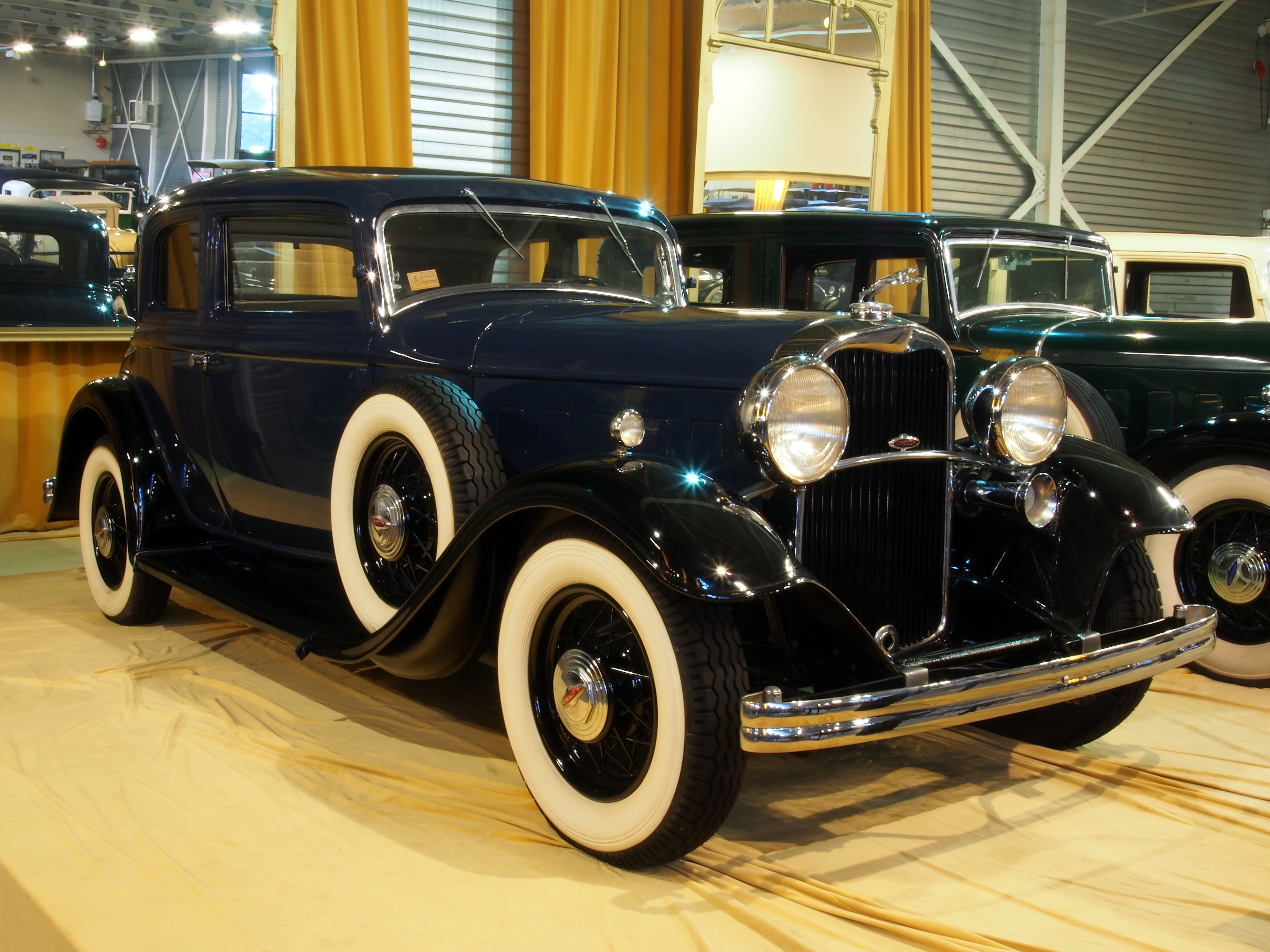 Den Hartogh Ford Museum; 1932 Lincoln Model KA (series 501) Victoria Model 506